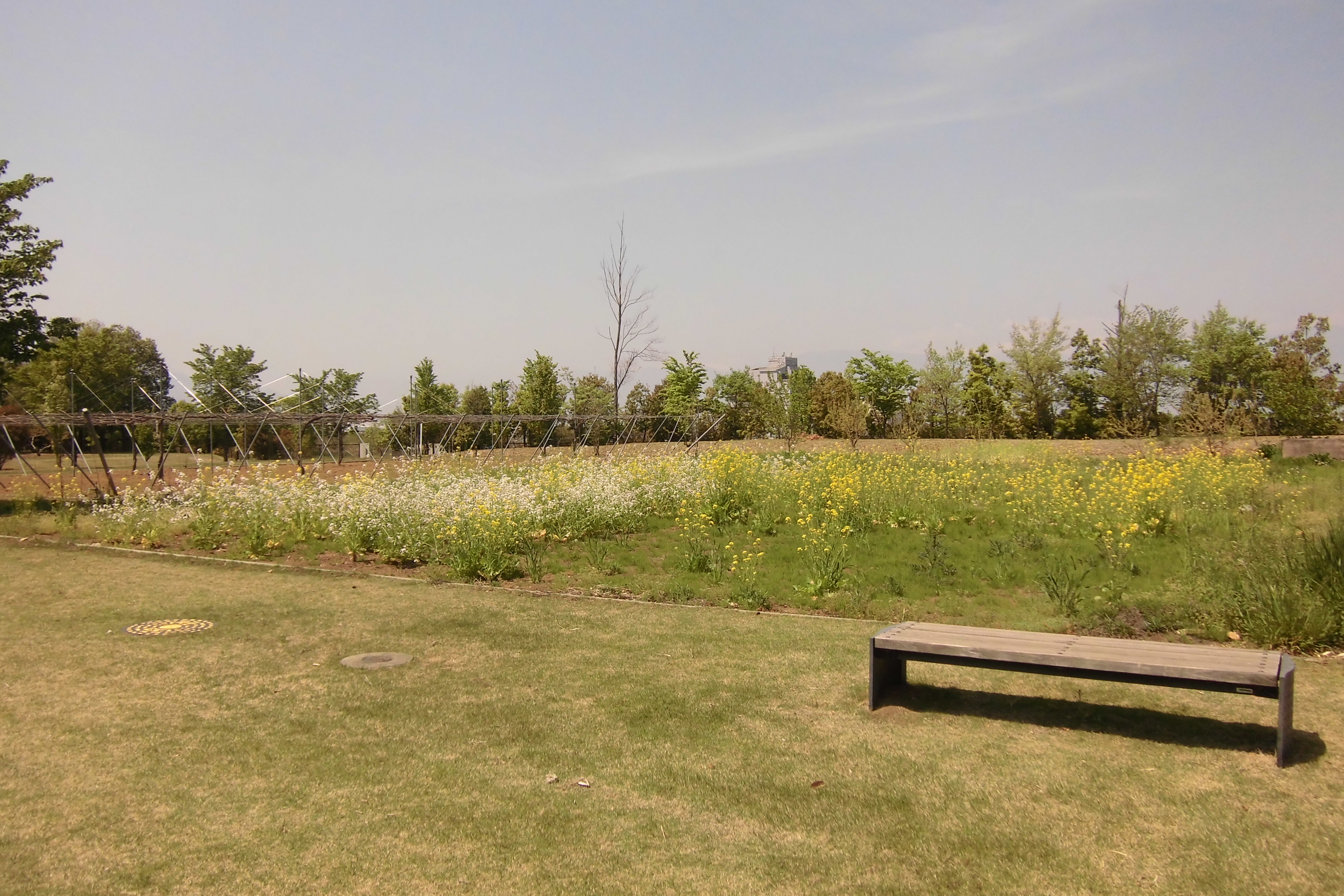 山梨県立博物館（古代の畑）